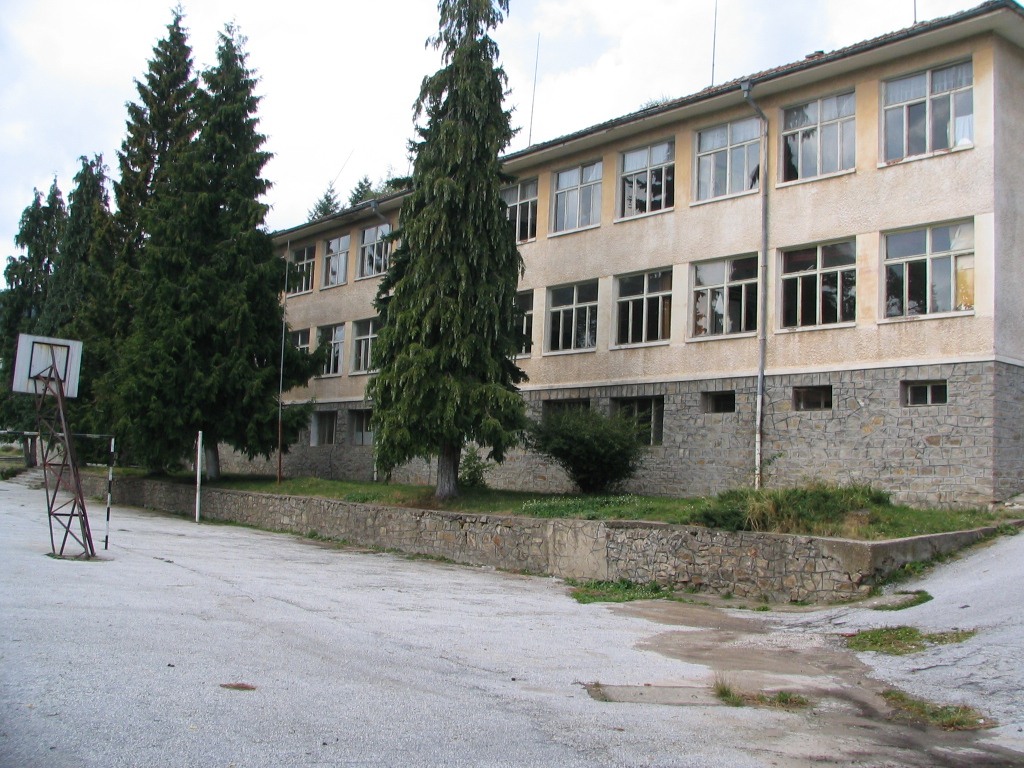 Сграда на училището